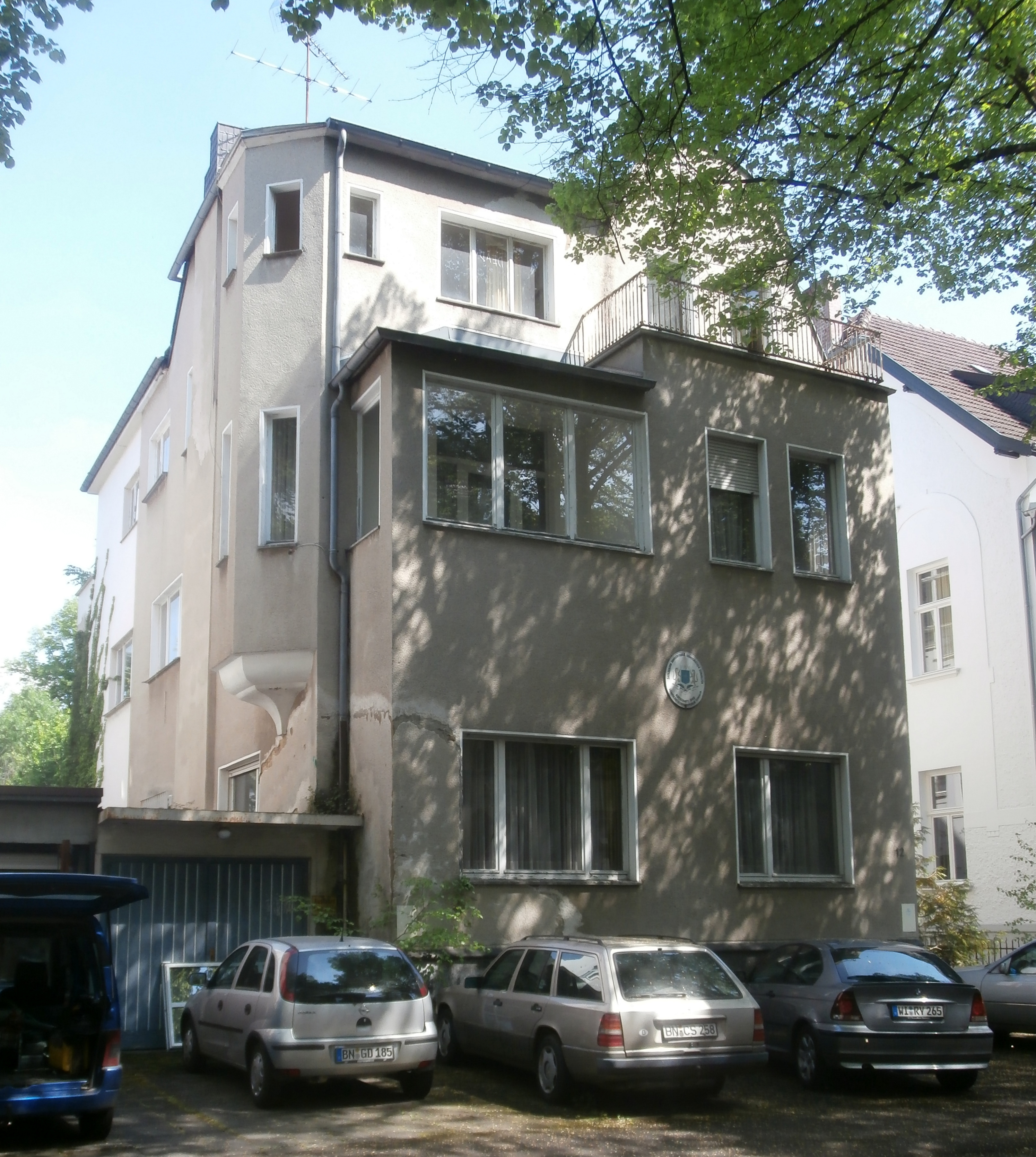 Ehemalige Botschaft der Demokratischen Republik Somalia, Hohenzollernstraße 12, Bad Godesberg